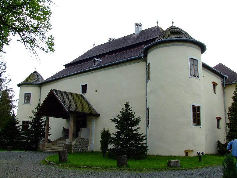 Melczer-kastély, Kéked